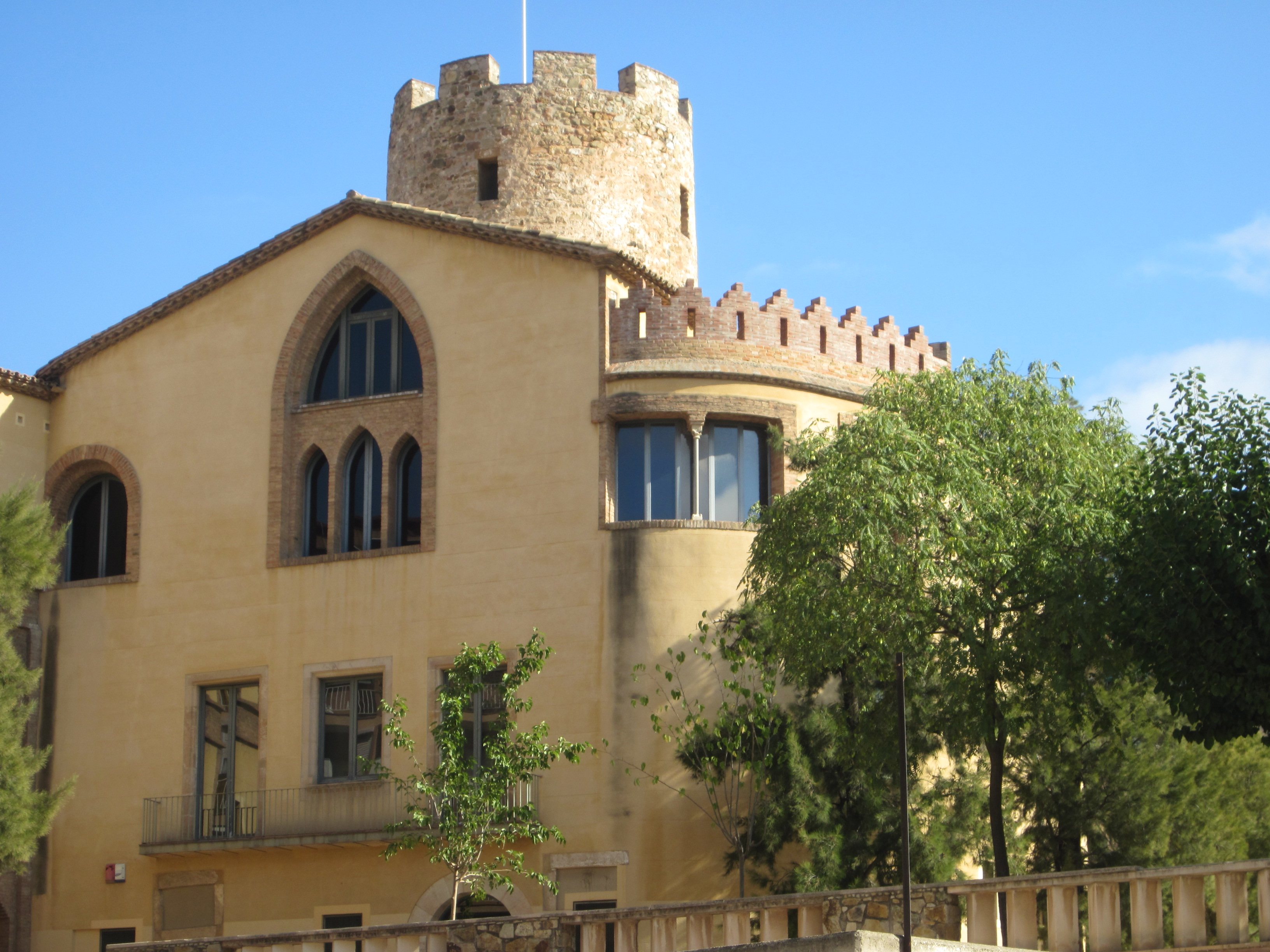 Torre Balldovina, Santa Coloma de Gramenet